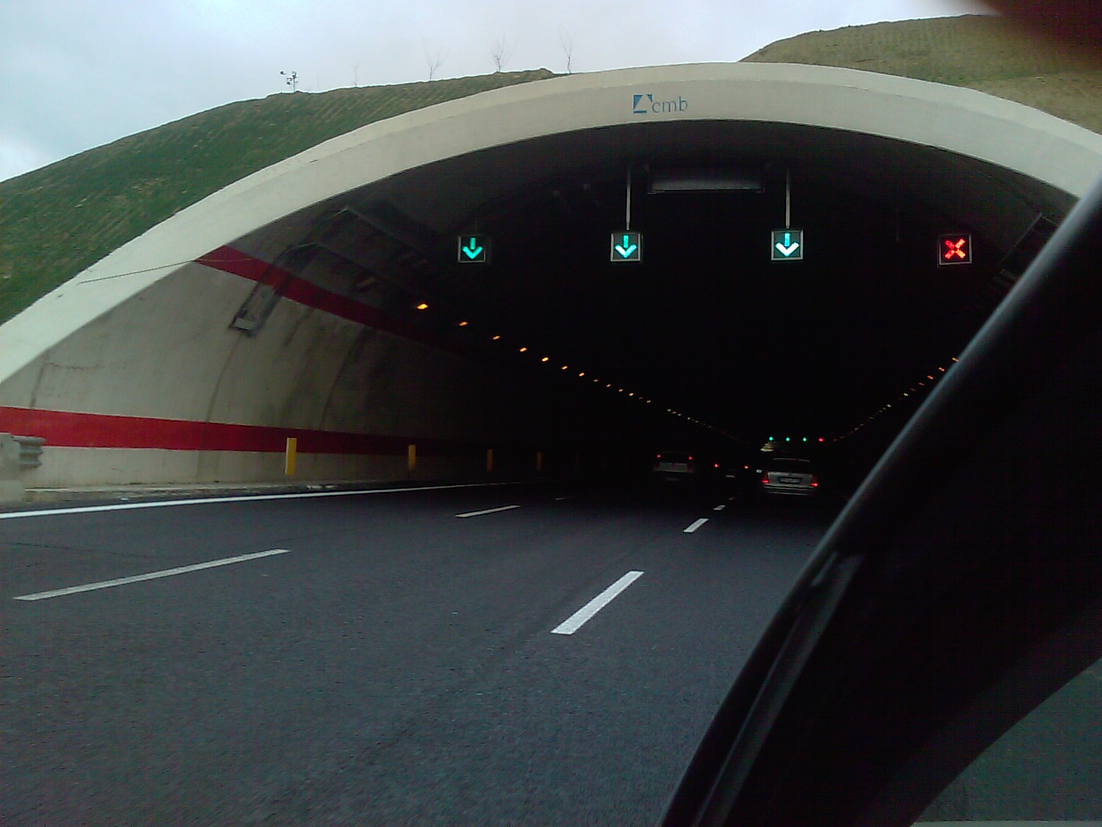 Grande Raccordo Anulare, galleria Trionfale